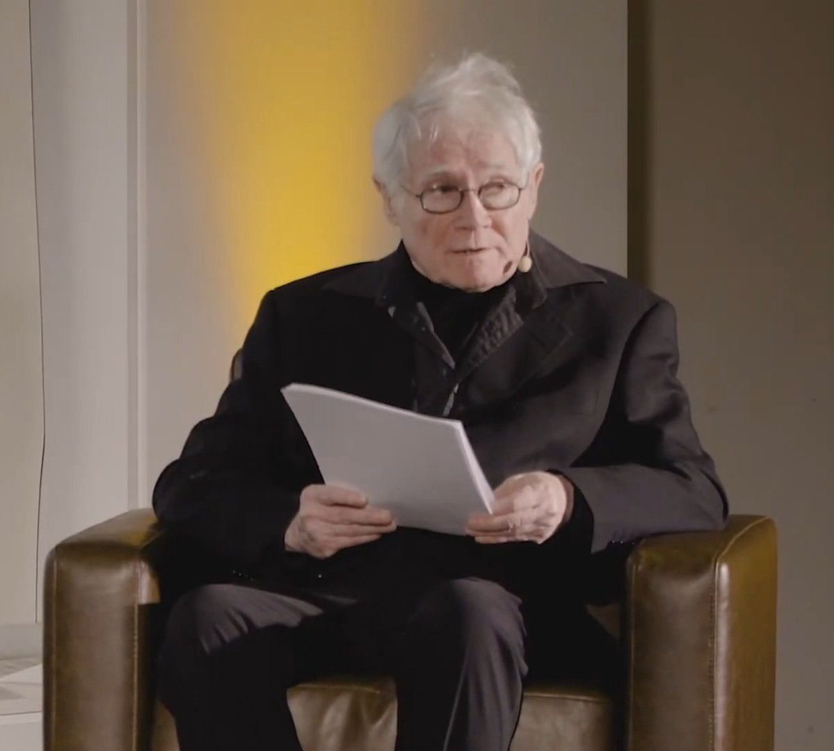 Große Zeiten. Eine Expedition zu Expeditionen als Gemeinschaftsaufgabe ** Als erste Etappe der Veranstaltungsreihe "Wissensreise" hatten der Stifterverband und die Deutsche Forschungsgemeinschaft zu einer besonderen Lesung am 11. Februar 2020 in Hamburg eingeladen. "Reiseleiterin" war die Meeresbiologin und Communicator-Preisträgerin Antje Boetius, die Einblicke in die wissenschaftliche Arbeit vor 100 Jahren gab. An ihrer Seite war der Schauspieler Peter Weis: Er las aus Originalbriefen, die Teilnehmer berühmter Forschungsexpeditionen geschrieben hatten — Alfred Merz, Willi Rickmer Rickmers und Alfred Wegener hatten zwischen 1925 und 1931 den Atlantik, das zentralasiatische Pamir-Gebirge bzw. Grönland erkundet. Was sie aufgezeichnet hatten, vermittelte ein authentischen Eindruck davon, unter welchen entbehrungsreichen Bedingungen damals geforscht wurde. Weitere Informationen zur Veranstaltung: Website zum 100-jährigen Jubiläum des Stifterverbandes